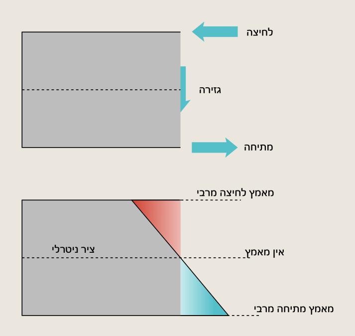 כוחות פנימיים בקורה העמוסה לכפיפה modified from image:Internal Forces and Stresses from Bending.png by י.ש.